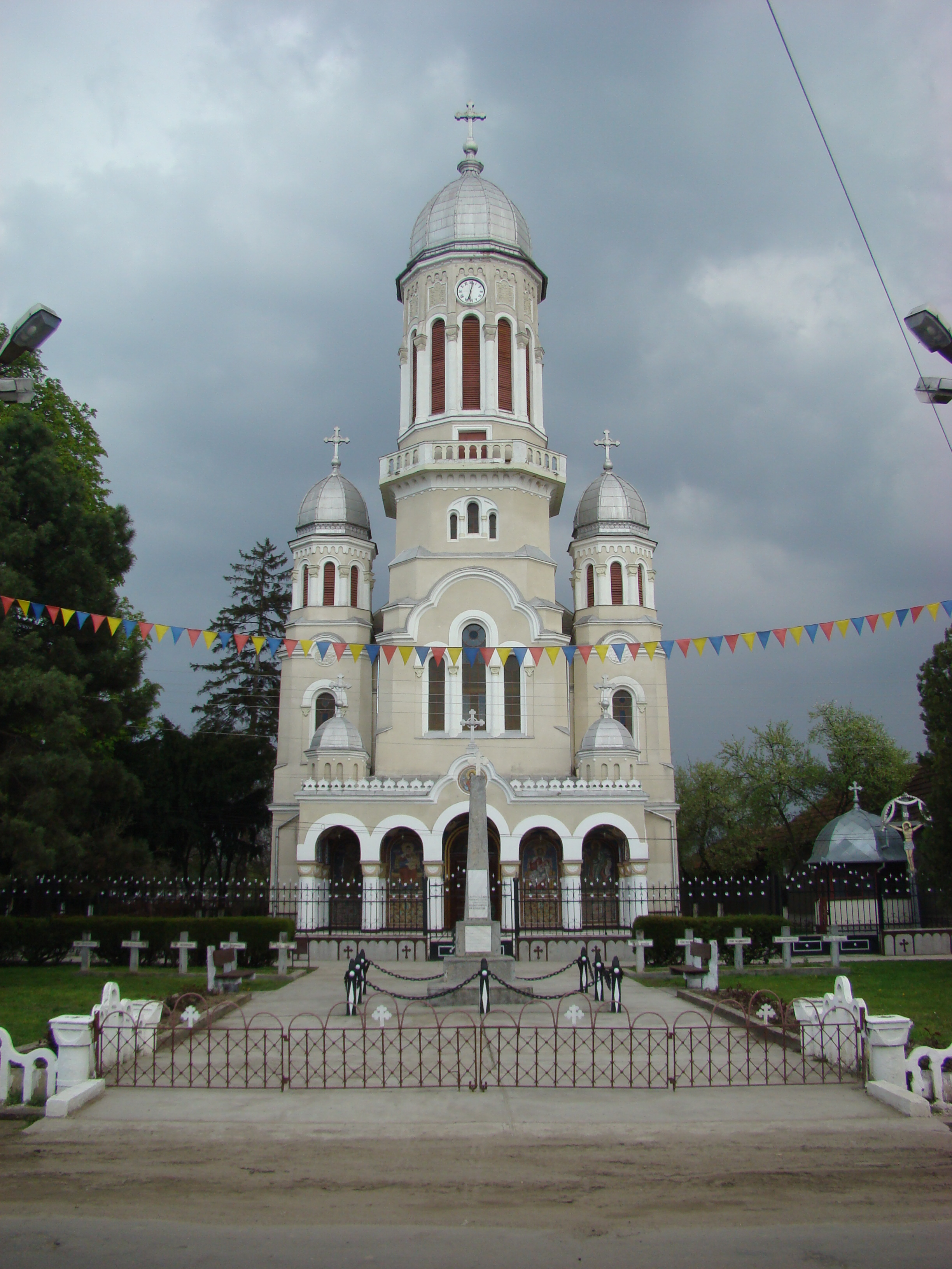 Biserica ortodoxă nouă din Tinca, Bihor